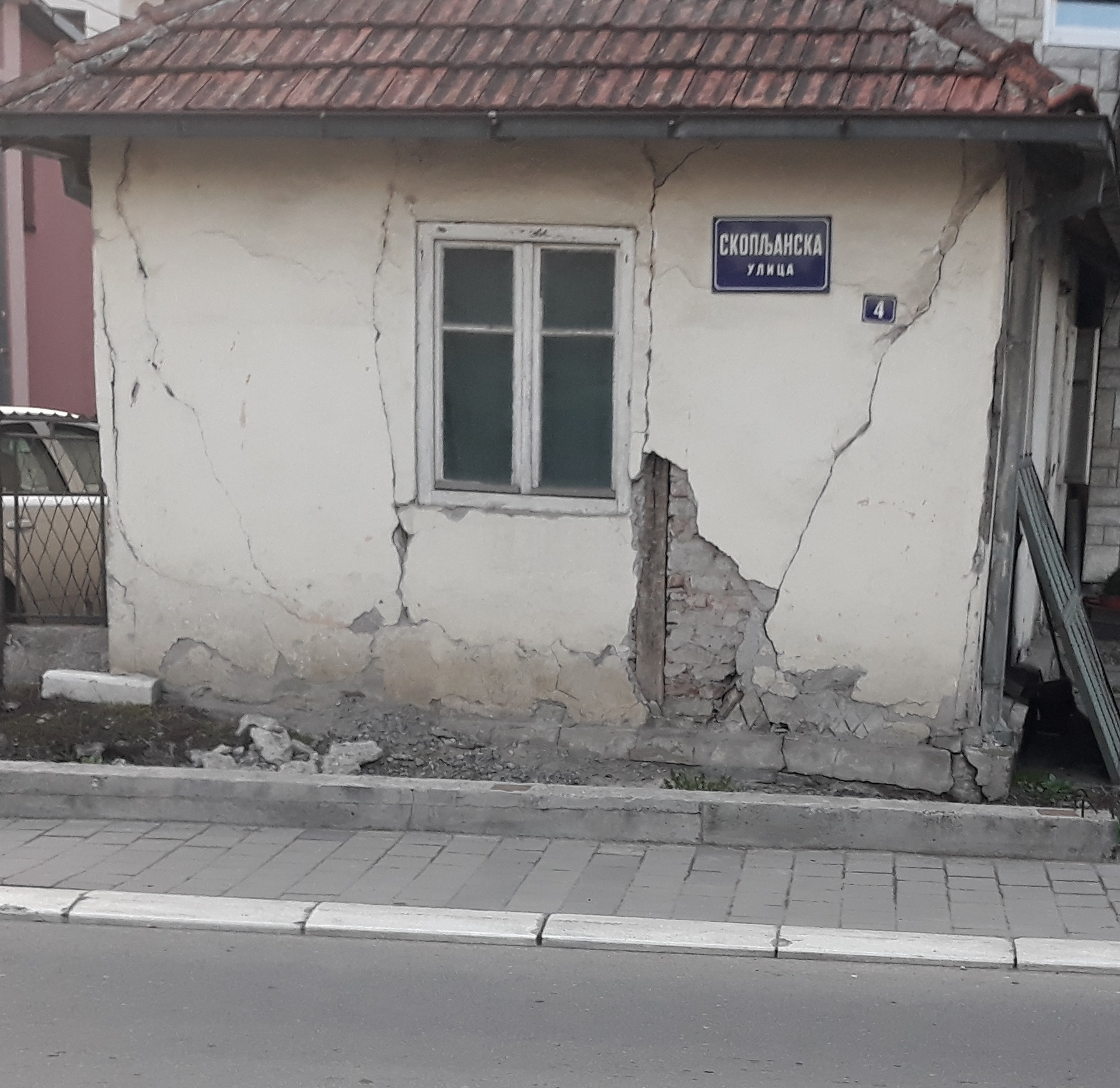 Мост преко Ибра у Краљеву, којим је Скопљанска улица спојена са десном обалом реке. Изграђен је донацијом Миломира Главчића, српског добротвора из Канаде, а отворен 2014. године.